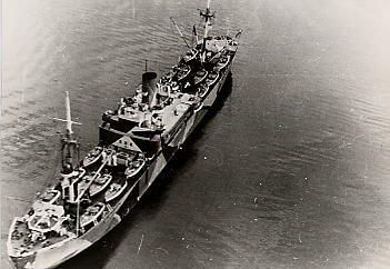 Das Mutterschiff für Räumboote MRS-11 der Kriegsmarine (eX Kombischiff Osnabrück des NDL)